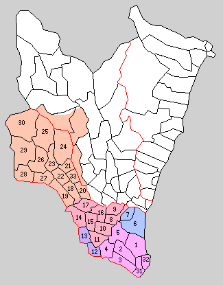 那珂郡の町村